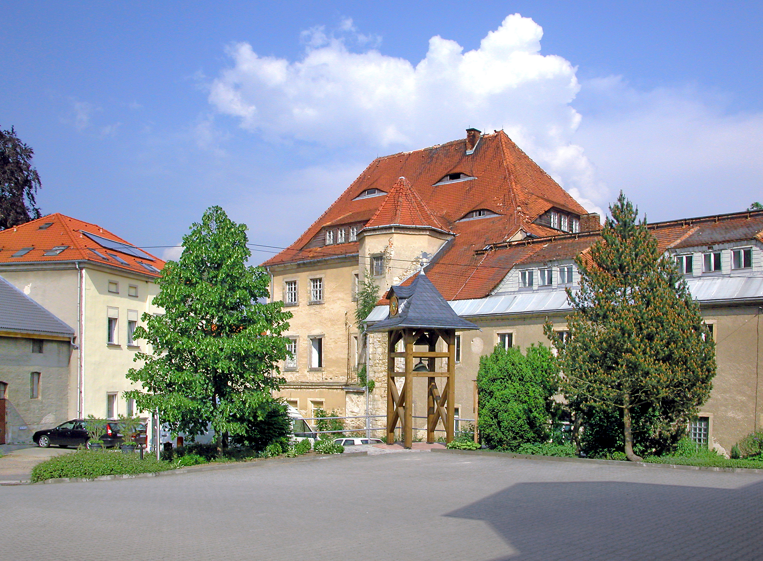 01.06.2008 01774 Klingenberg, Am Rittergut 6 (GMP: 50.917253,13.538943): Rittergut Klingenberg, Herrenhaus. Hofseite. [DSCN32937.TIF]20080601070DR.JPG(c)Blobelt